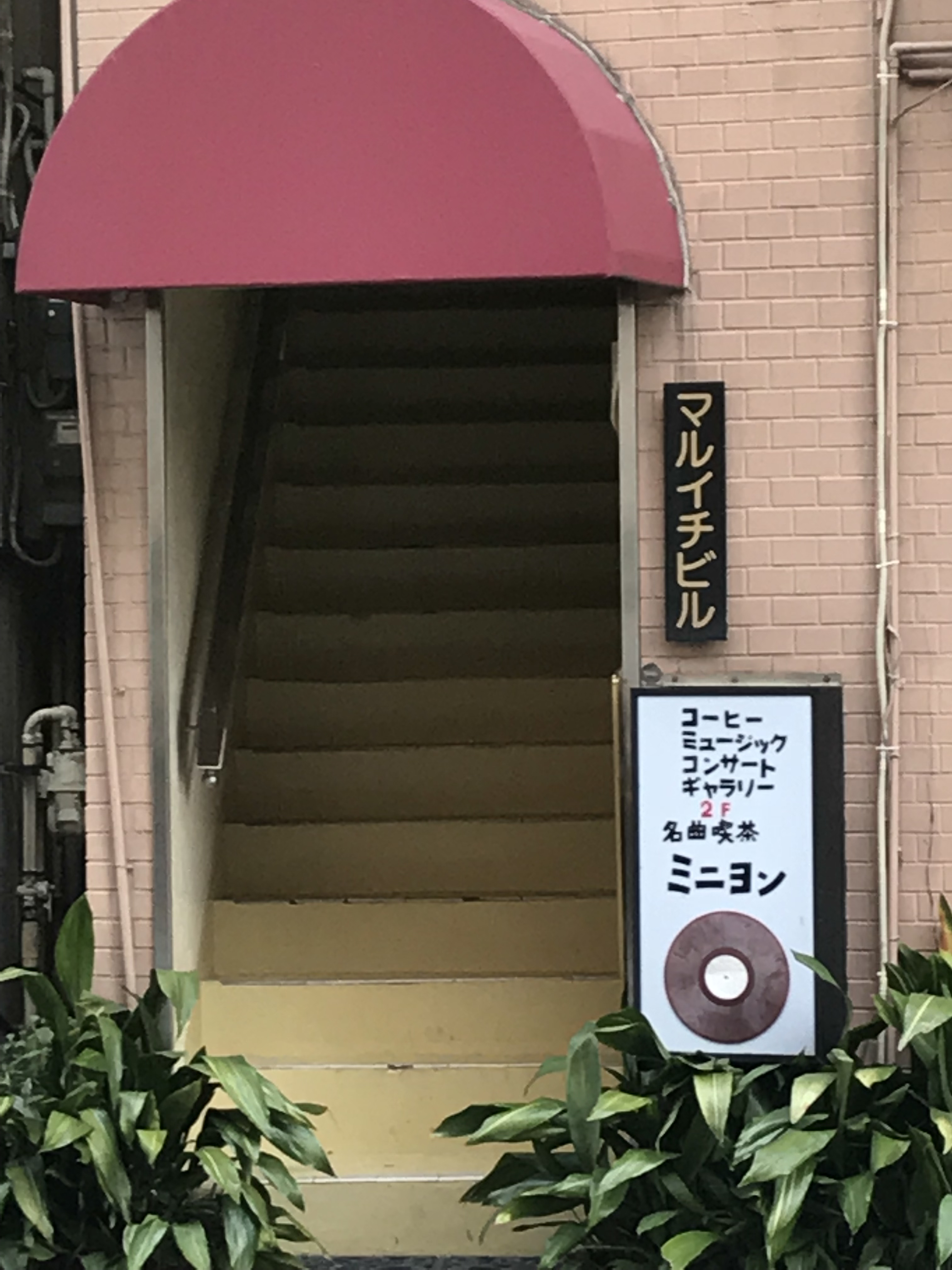 東京都杉並区荻窪の名曲喫茶ミニヨンの入り口付近の写真です。